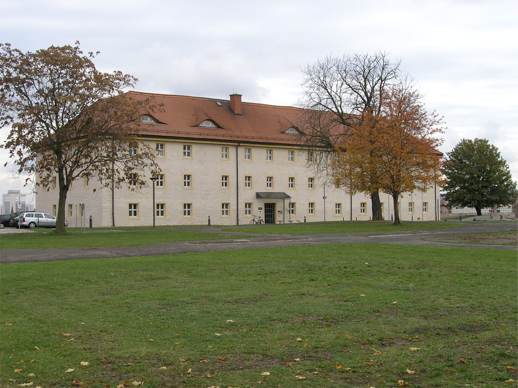 Artilleriekaserne/Kaserne B (errichtet zwischen 1679 und 1681) in der Zitadelle Petersberg in Erfurt